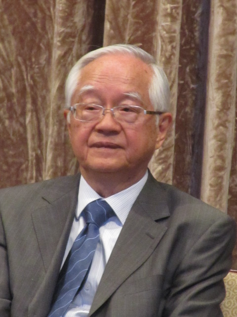 中国知名经济学家吴敬琏(美国之音 记者张佩芝拍摄)